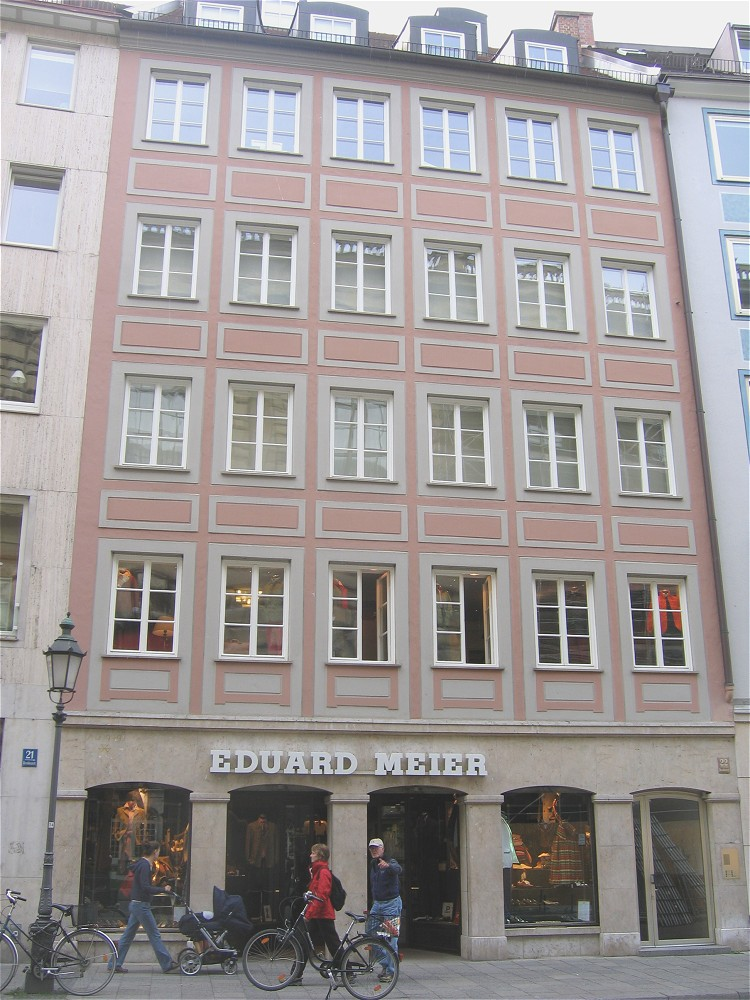 Eduard_Meier, ältestes Schuhgeschäft, Residenzstr. München